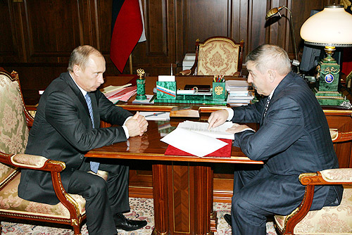 МОСКВА, КРЕМЛЬ. Рабочая встреча Президента Российской Федерации Владимира Путина с губернатором Рязанской области Георгием Шпаком.